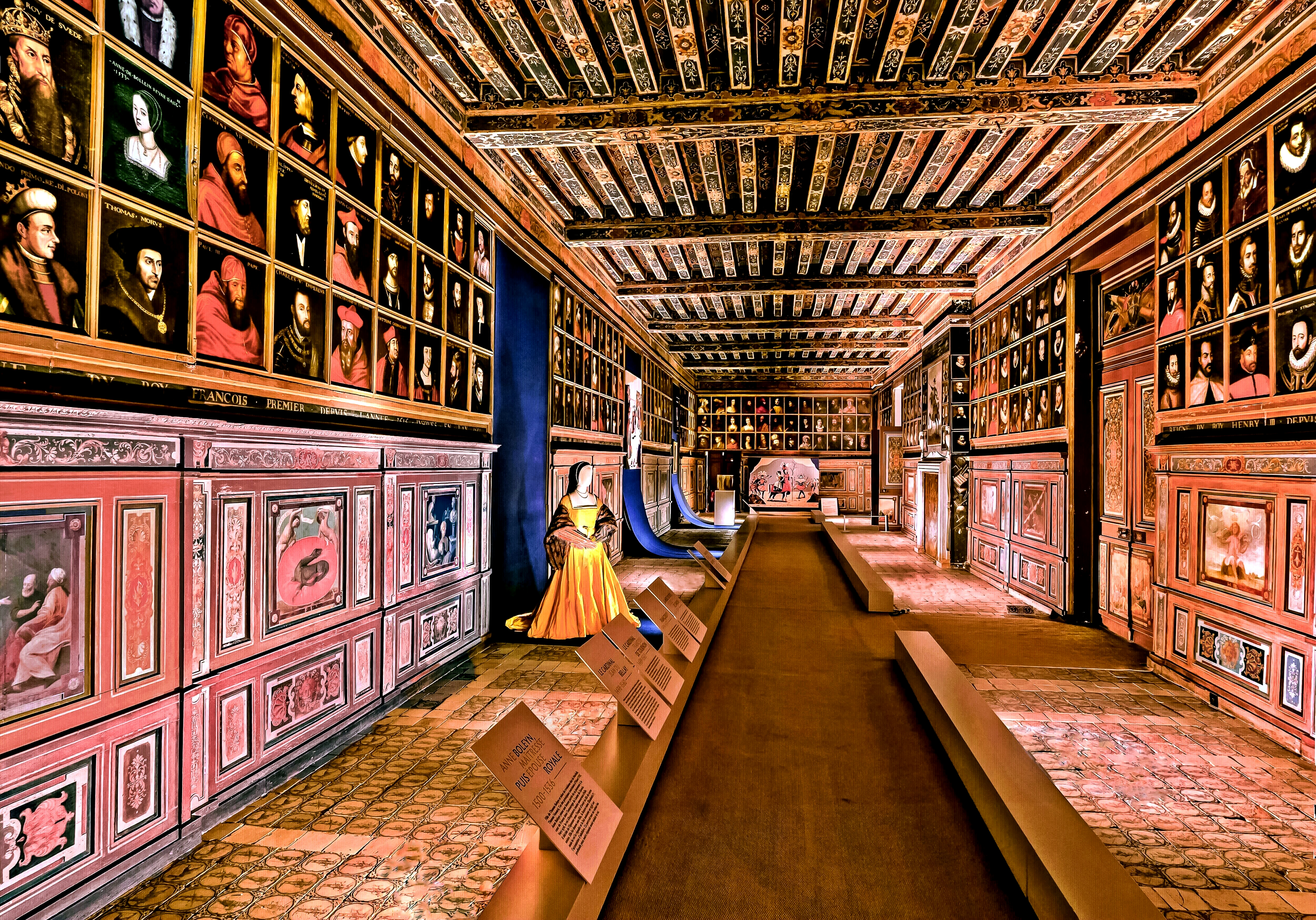 Schloss Beauregard, Porträtgalerie: Historisch bedeutende Persönlichkeiten aus der Zeit von Philipp von Valois bis Ludwig XIII., insgesamt 327 Porträts. Zustand nach vorzüglicher Restaurierung durch die Schlossherren.